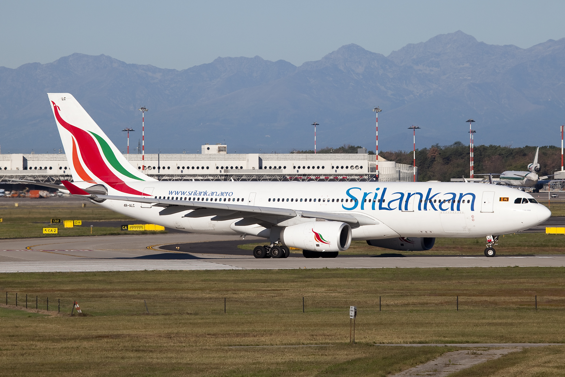 Milaan-Malpensa